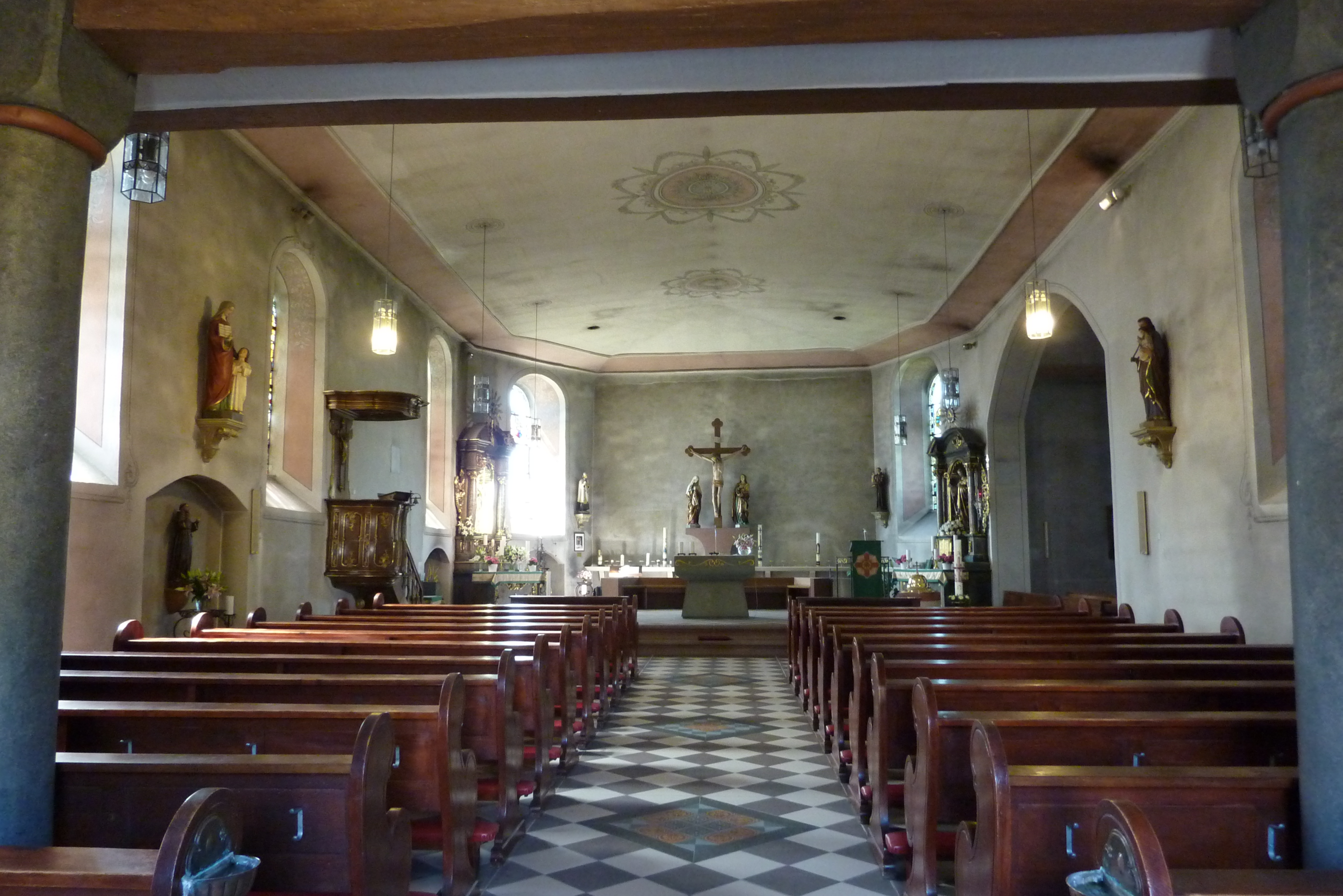 Pfarrkirche St. Gertrud in Barweiler, Innenansicht